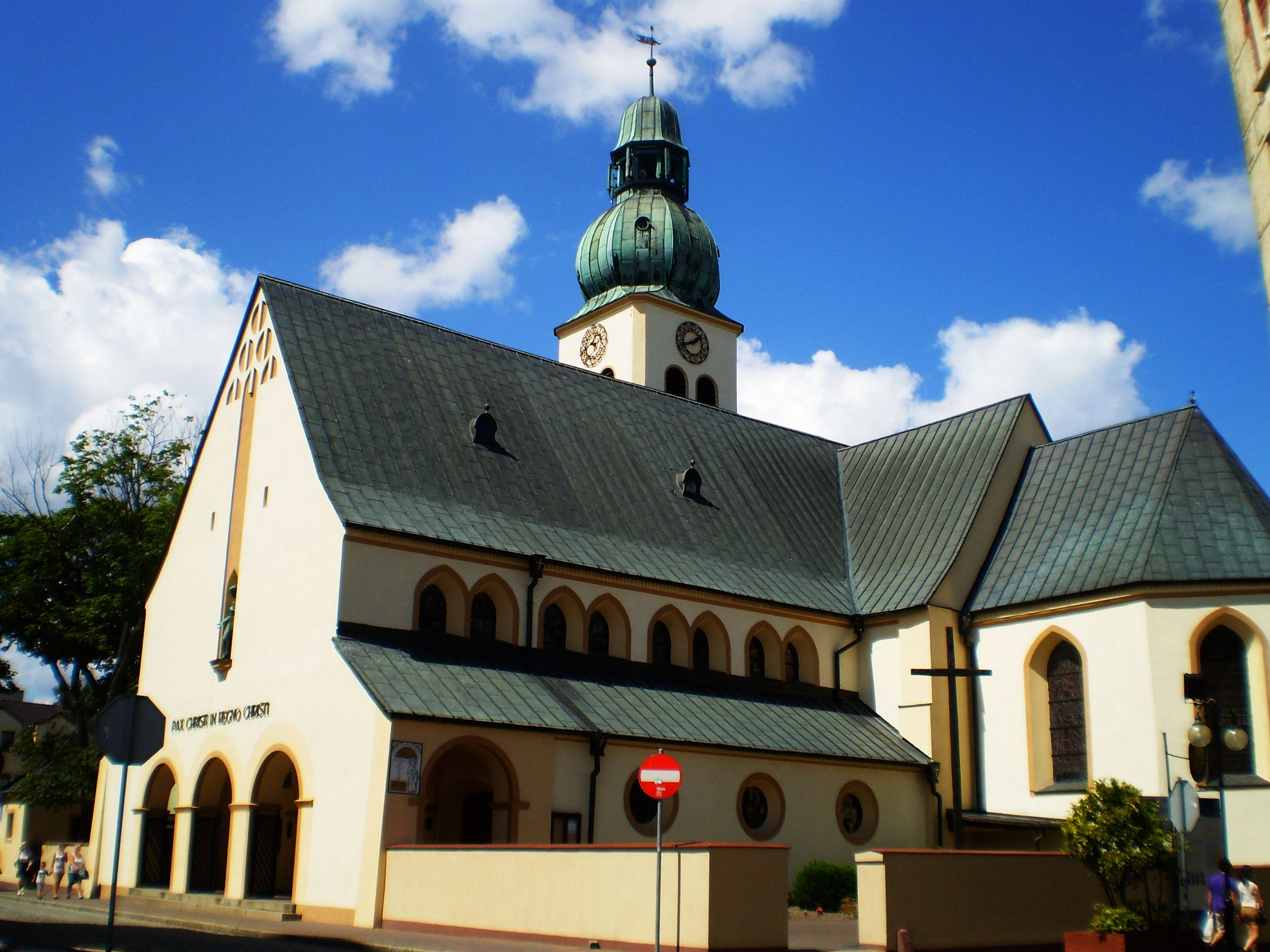 Człuchów - rzymskokatolicki kościół parafialny p.w. św. Jakuba, 1644-1647, 1926-1928